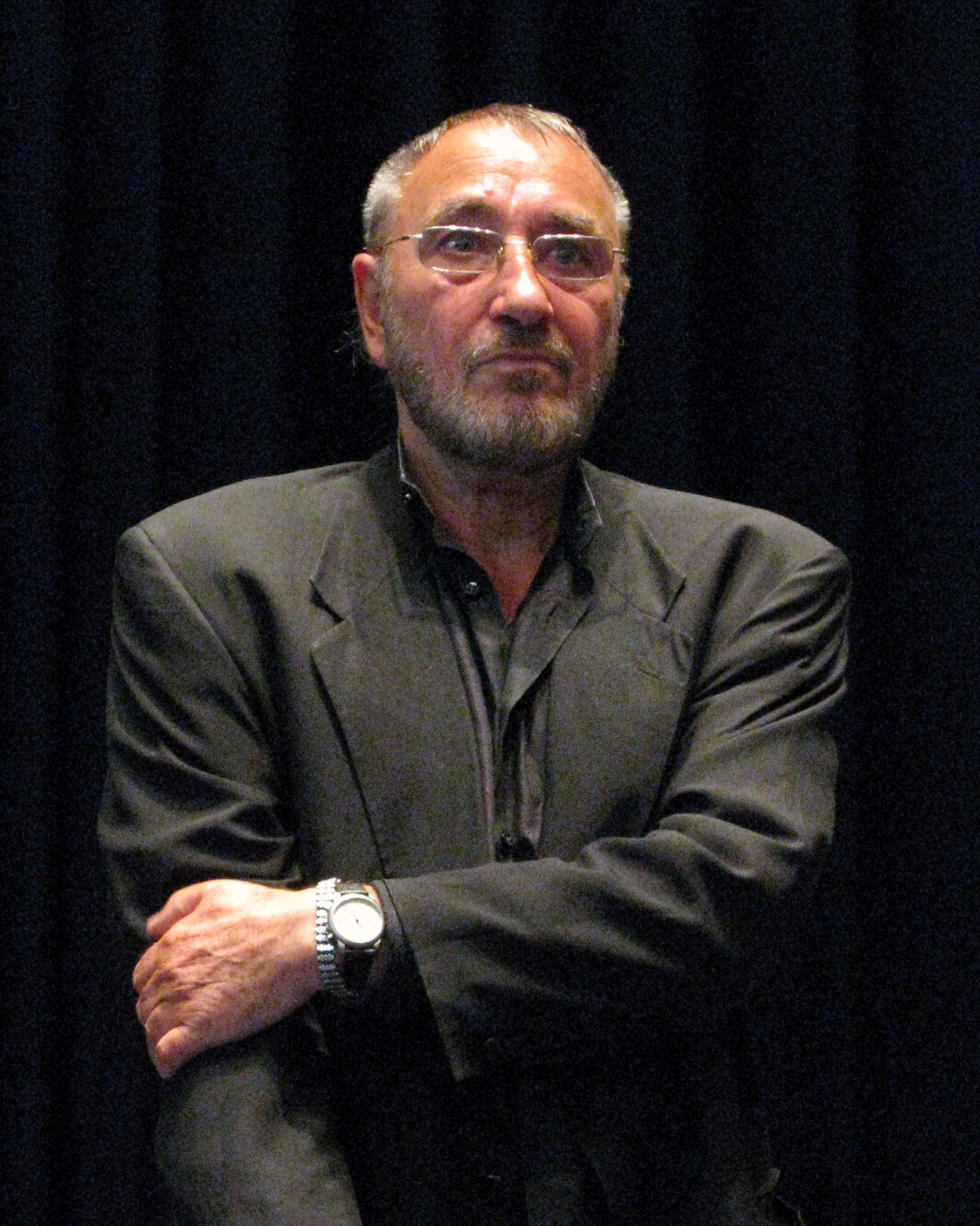 Publikumsgespräch mit Jürgen Böttcher zu seinem Film „Die Mauer“ im Zeughauskino Berlin, 28.05.2009